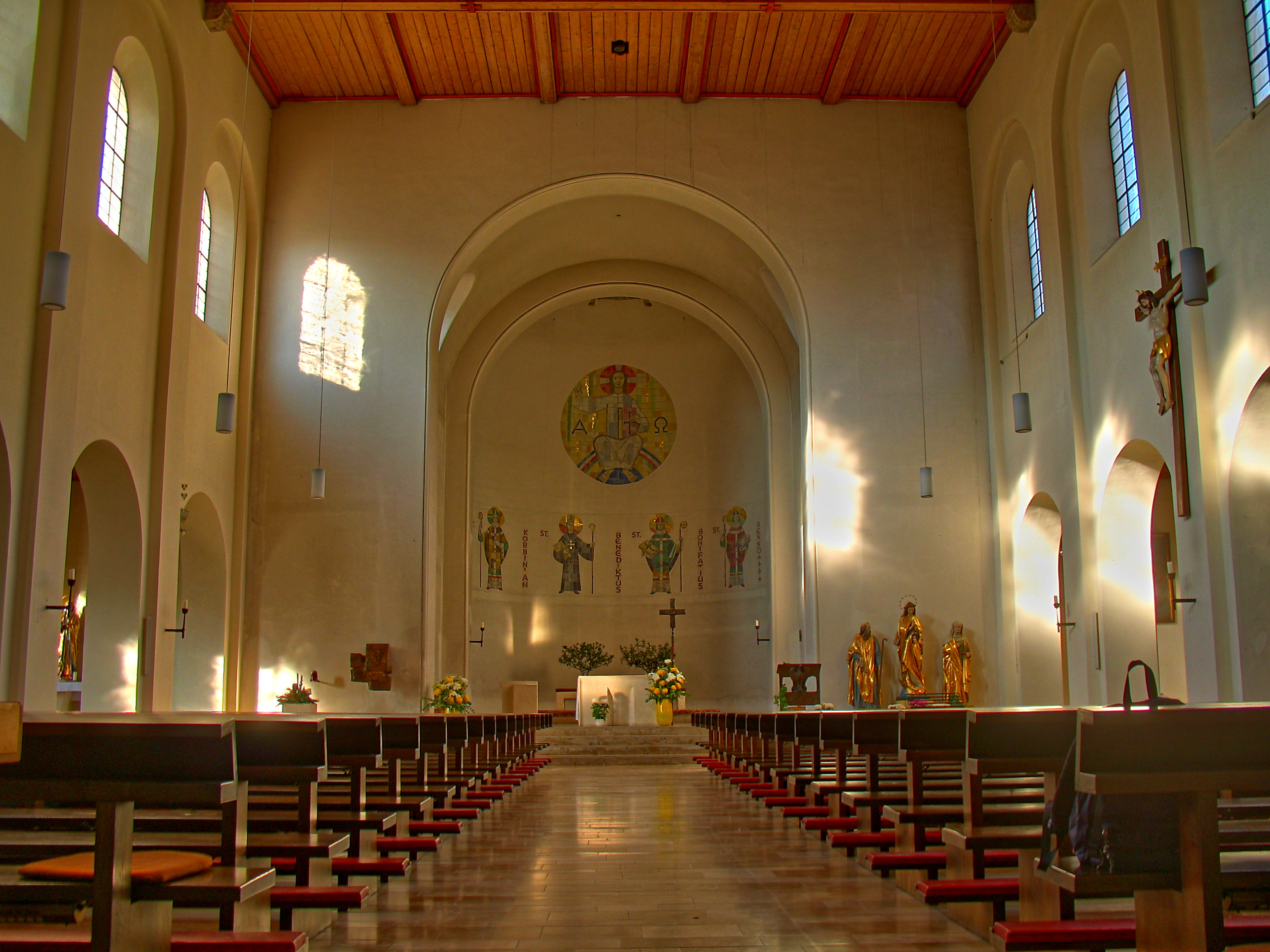 Germany, Bavaria, Munich, Schrenkstraße, Kirche St. Benedikt, Innenraum, HDR Aufnahme